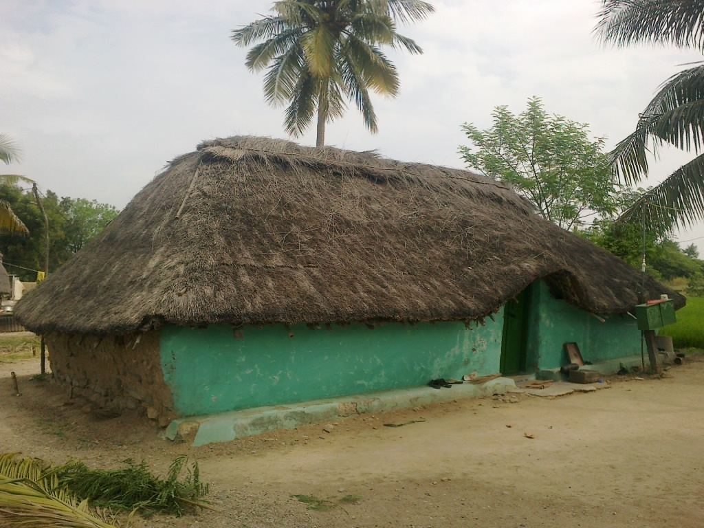 ஏரிக்கோரையால் ஆன குடிசை வீடு.